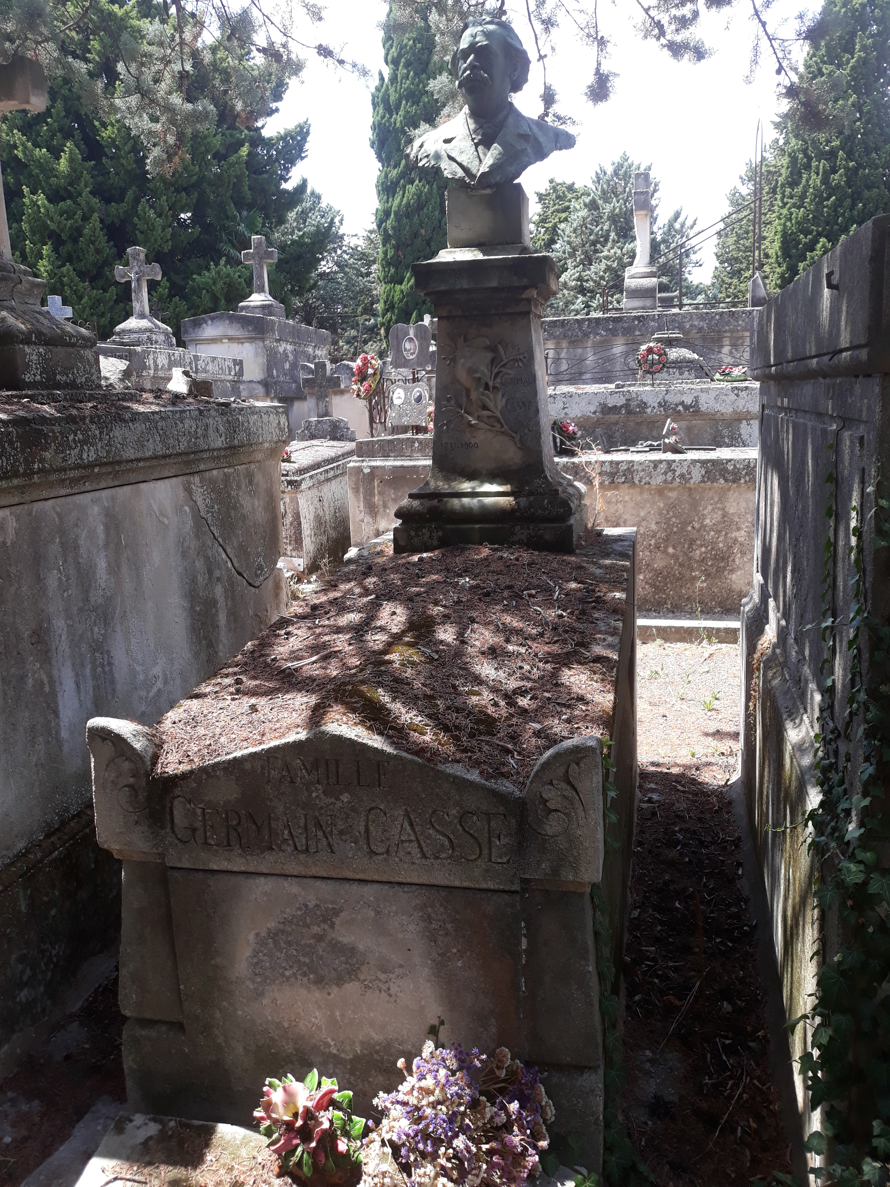 Das Grab des französischen Politikers und Journalisten Germain Casse auf dem Cimetière Saint-Véran in Avignon.